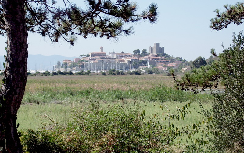 Panorama di Talamone dall'omonimo golfo